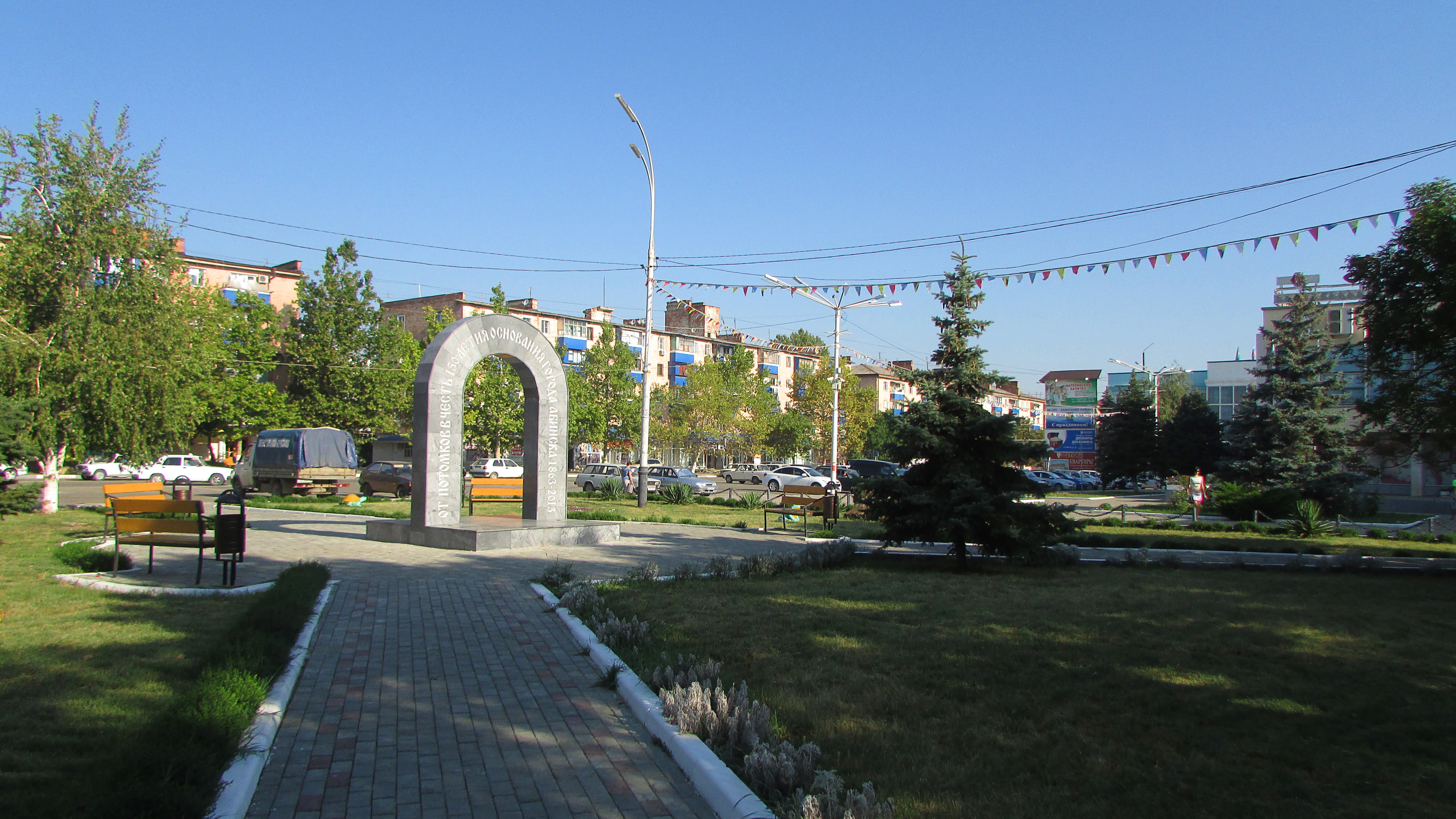 Monument in the center of Abinsk. August 2014. / Монумент в центре Абинска. Август 2014.